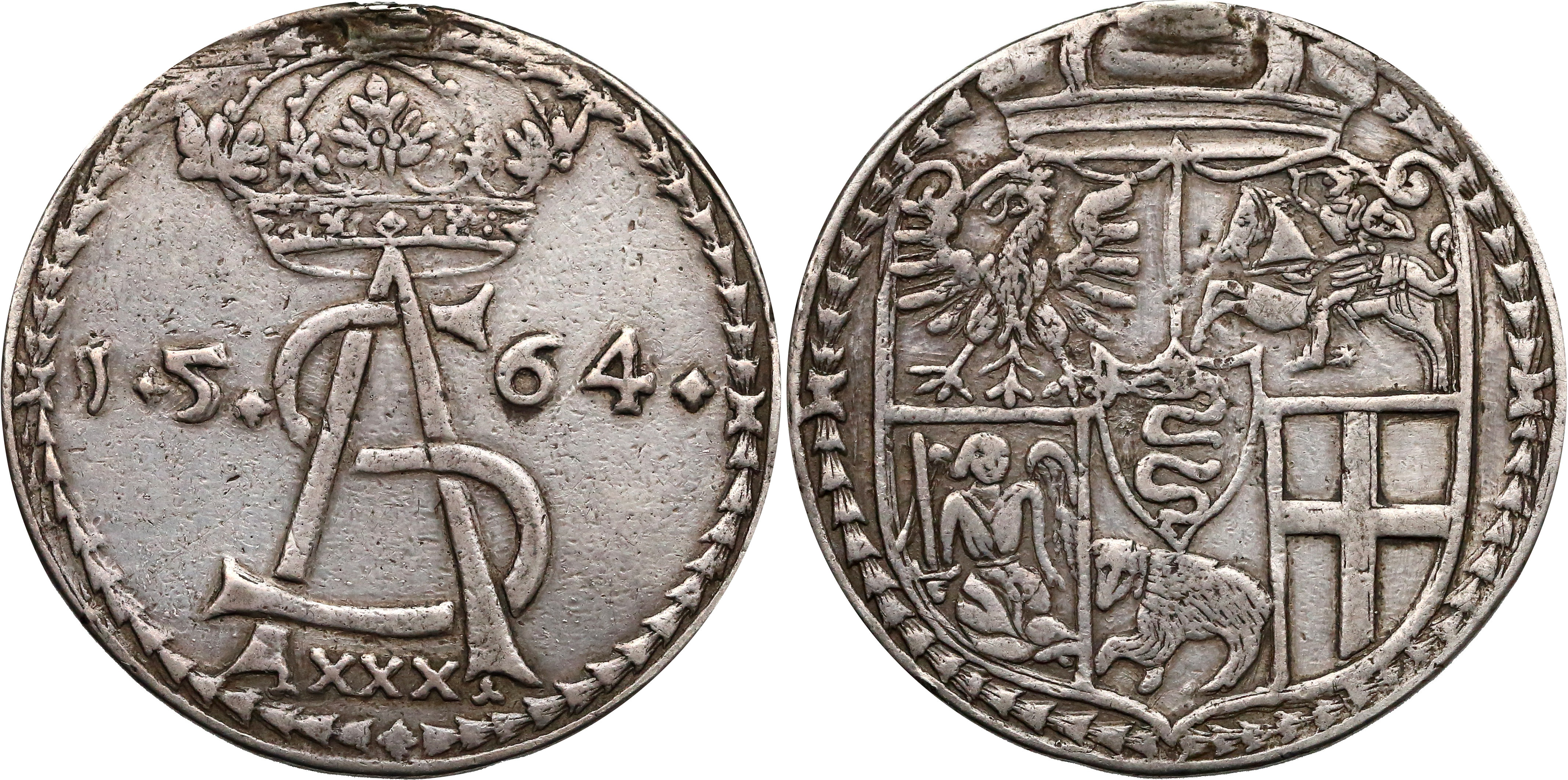 Półkopek litewski 1564 awers i rewers